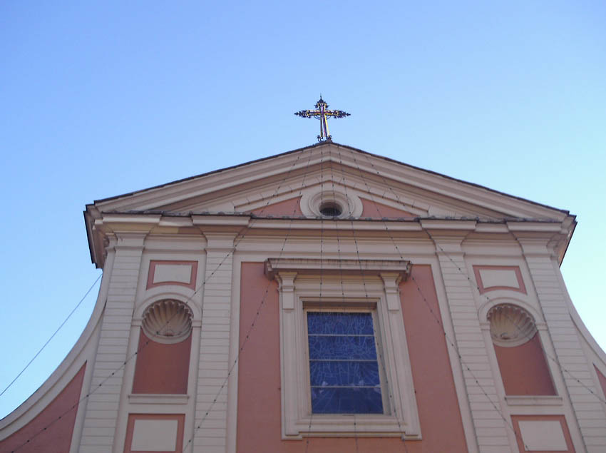 Castelfranco Emilia (MO) - Chiesa